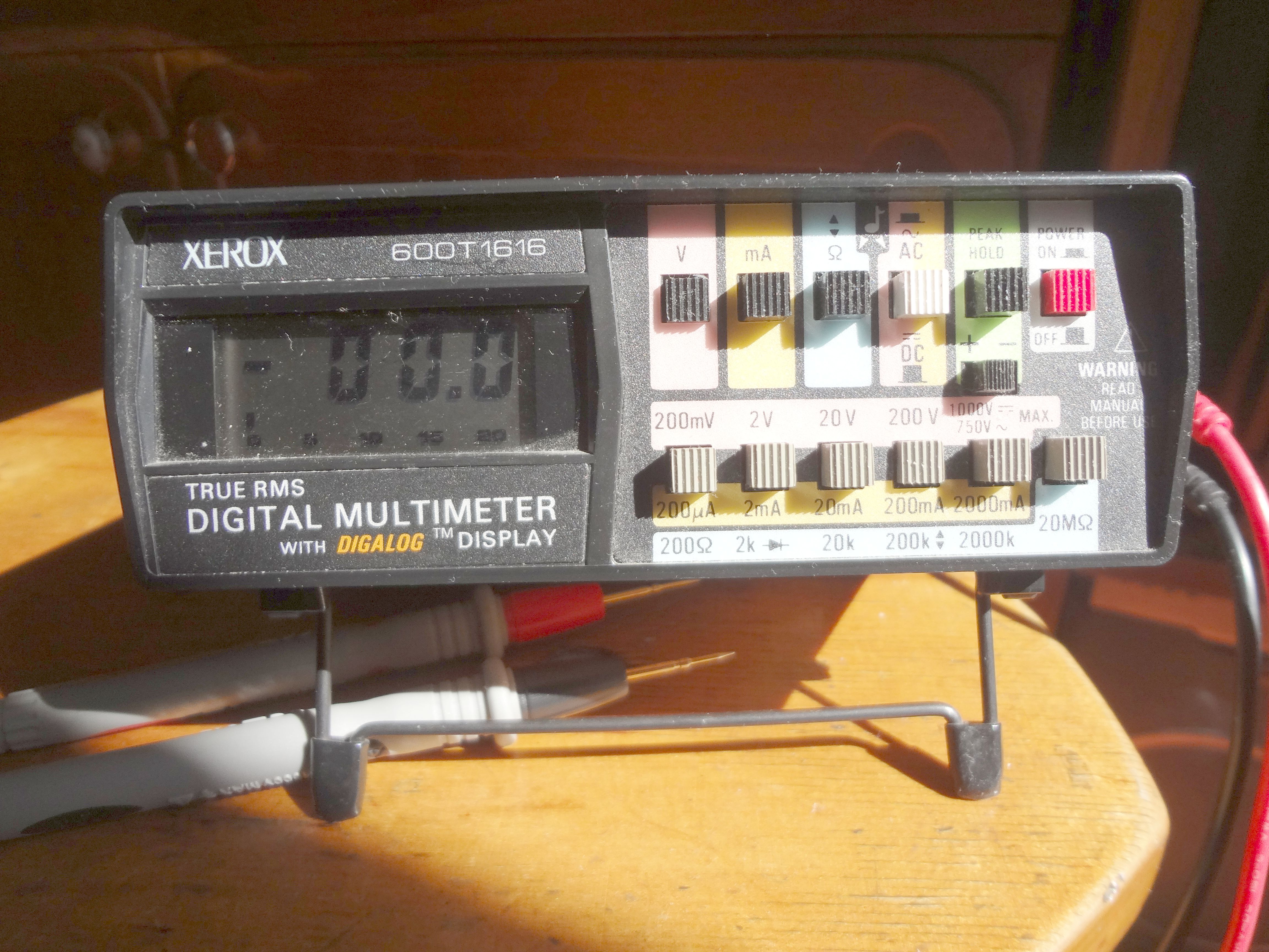 Цифровий мультиметр Xerox 600T1616 (копія Simpson 467) 1990 р.в. TRUE RMS та з функцією аналогової шкали (bar graph) для відслідковування швидких змін сигналу.